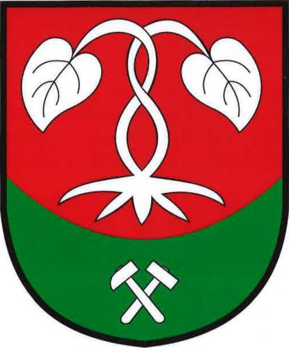 znak, Jemníky, okres Kladno